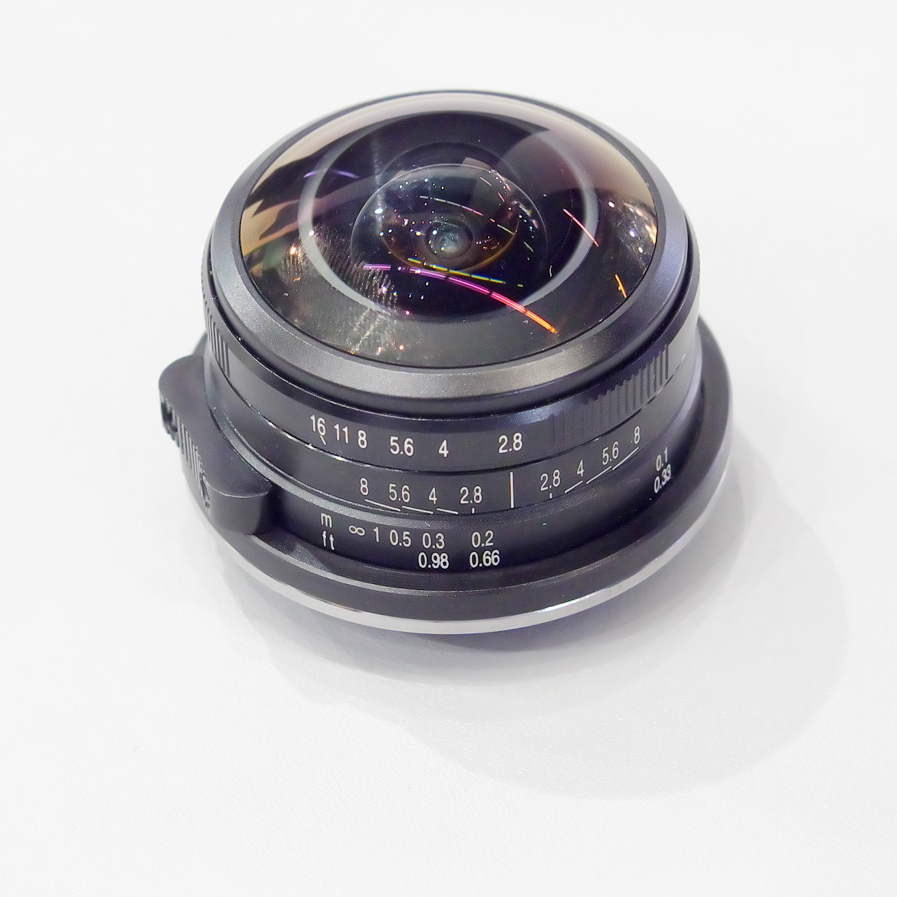 Fischaugenobjektiv Laowa 4 mm f/2,8 von Venus Optics für Micro Four Thirds auf der photokina 2018